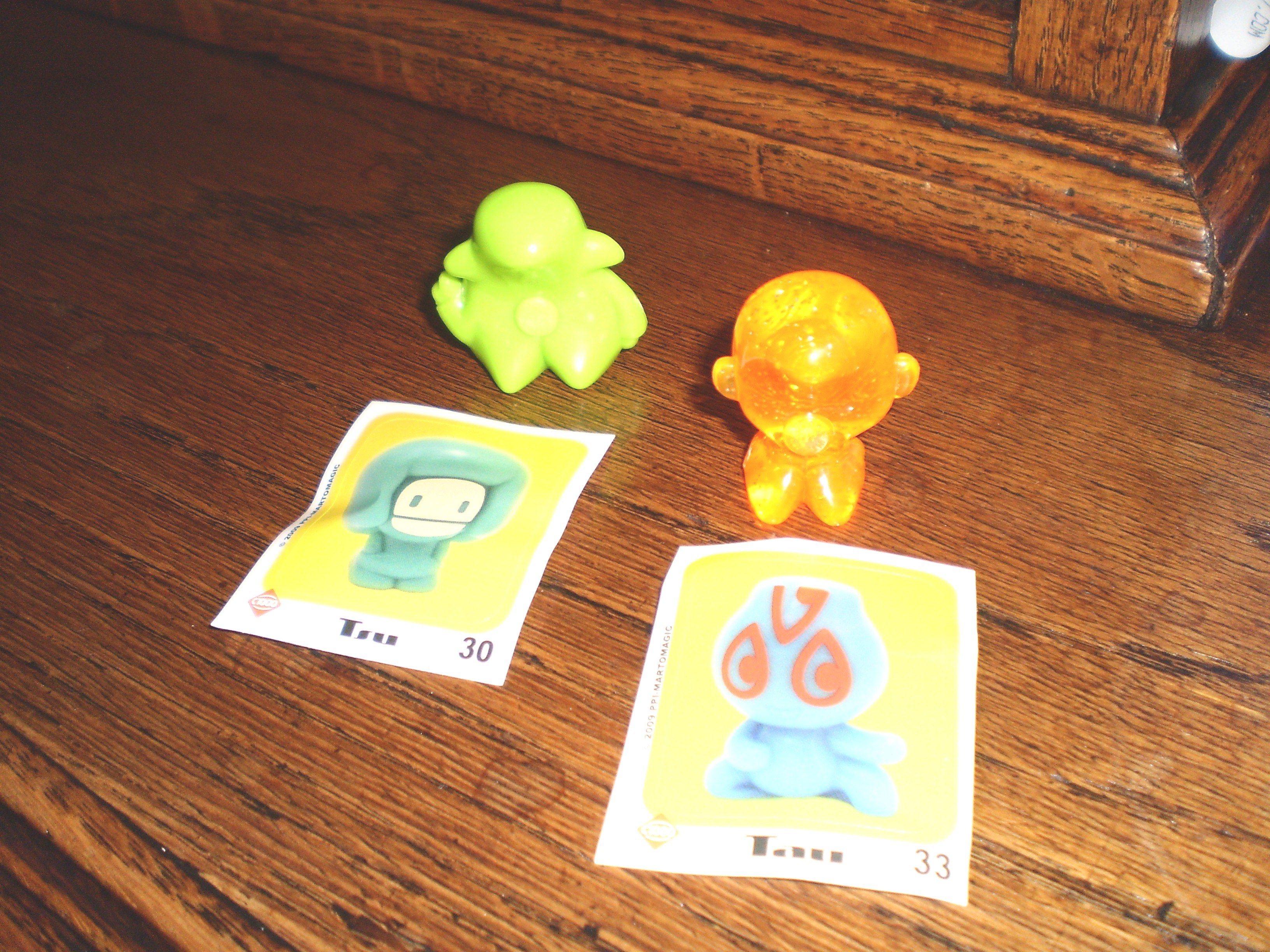 Gogo-ferpakking